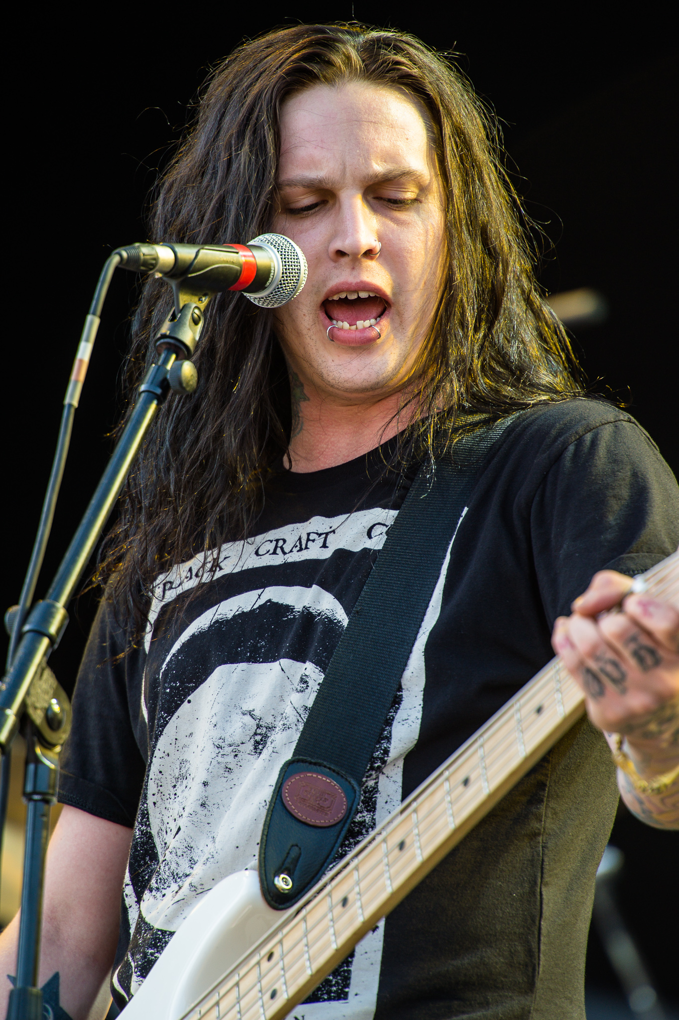 ARGO-Konzerte,Centerstage,Falling in Reverse,Konzert,Livekonzert,Livemusik,Max Green,Musik,RiP,Rock im Park 2014